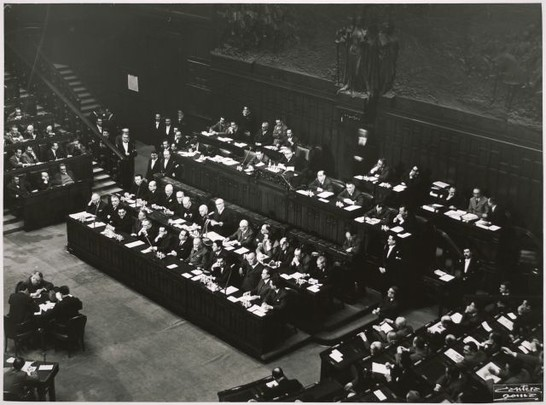 Presentazione alla Camera dei Deputati del IV Governo Fanfani